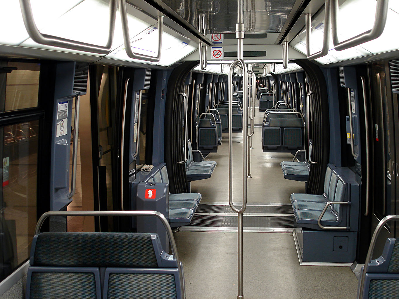 Intérieur d'une rame MP 89 CA de la ligne 14 du métro de Paris, France